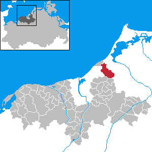 Gelbensande in Mecklenburg-Western Pomerania - District Bad Doberan